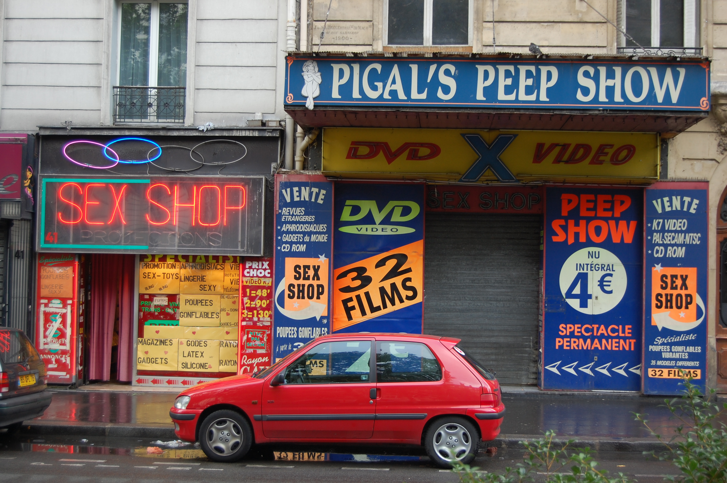 Pigal's Peep Show